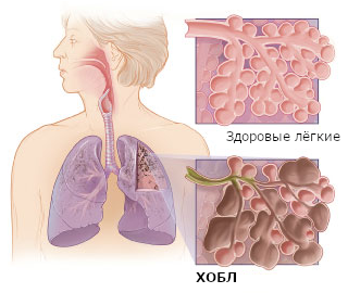 Сравнение здоровых лёгких и лёгких больного ХОБЛ